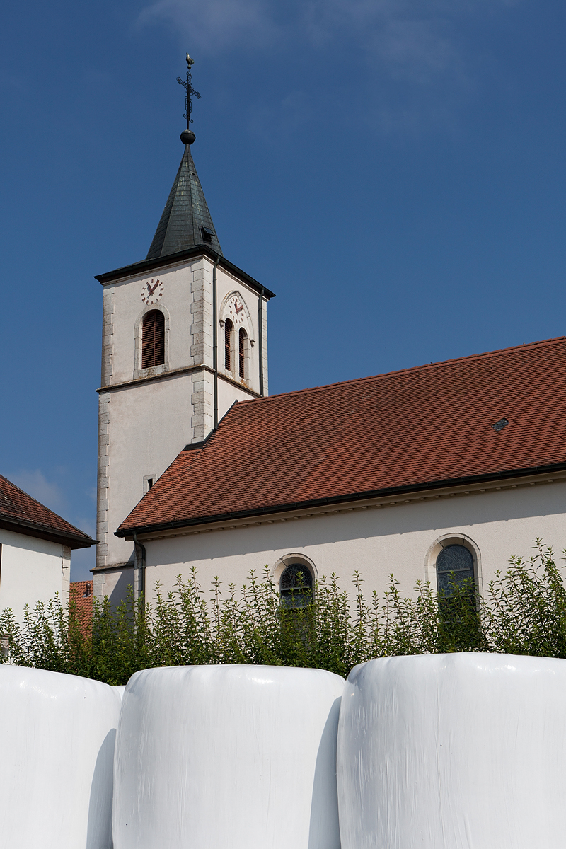 Eglise Saint-François-Xavier à Rocourt (JU)